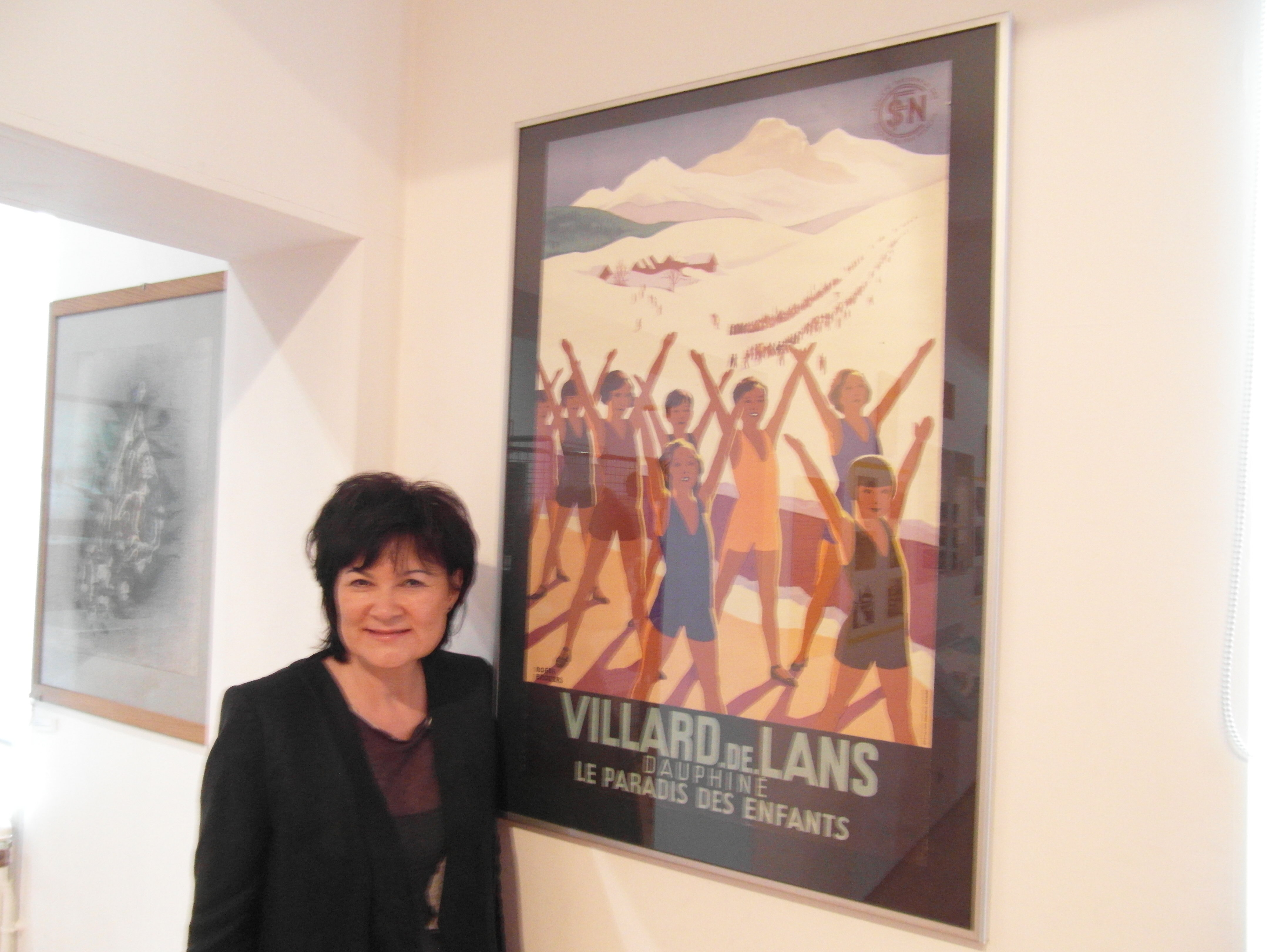 Chantal Carlioz, maire de Villard-de-Lans, vice-présidente du Conseil Général